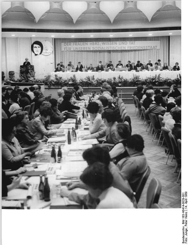 Zentralbild Junge-Lo-14.4.69 Berlin: DFD-Bezirksdelegiertenkonferenz 350 Berlinerinnen beraten am 14.4.69 darüber, wie die Frauen der Hauptstadt geführt von der Partei der Arbeiterklasse, die Aufgaben zur weiteren Stärkung der DDR meistern können. Die Vorsitzende des DFD-Bezirksvorstandes Berlin, Anneliese Glaner, (am Rednerpult), berichtete über vielfältige Initiativen der Hauptstädterinnen auf den verschiedensten Gebieten sowie über die Einbeziehung der Frauen in den umfassenden Aufbau des Sozialismus.